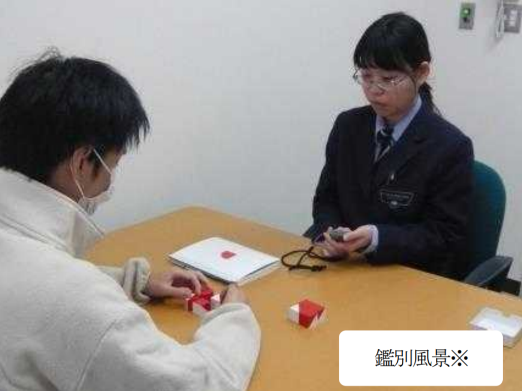 鑑別風景（矯正心理専門職）